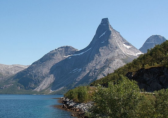 Stetind (mountain 1,392 m /4600 ft and a branch of Tysfjord, Norway)